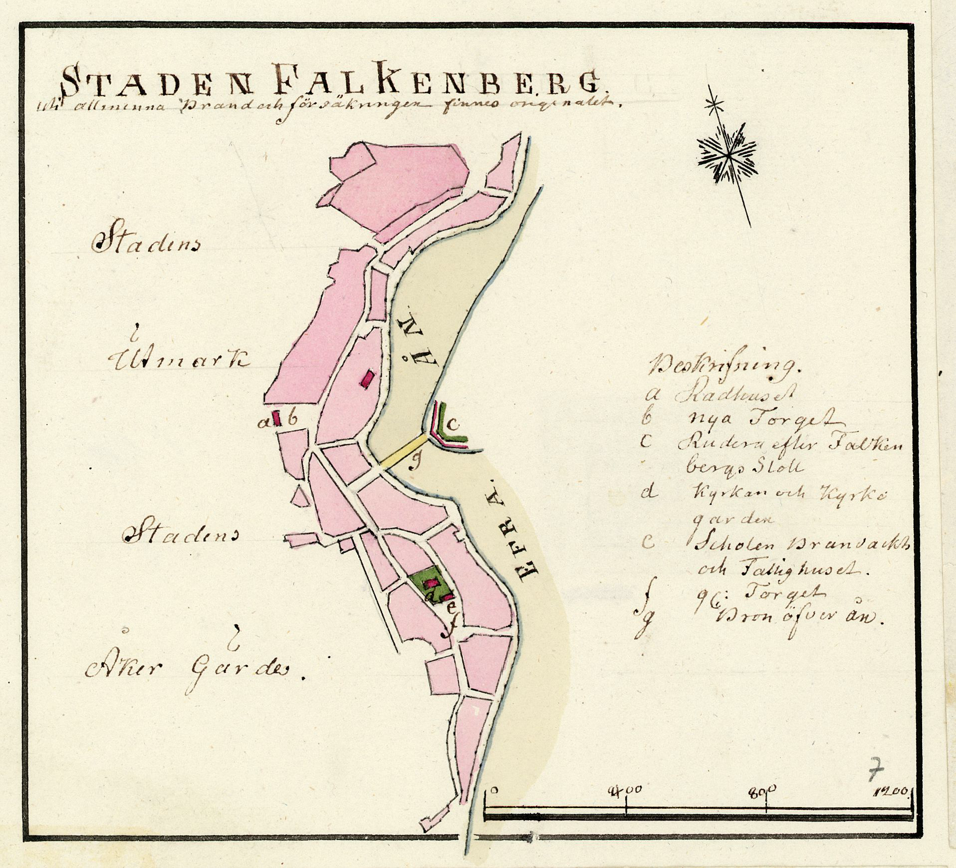 Karta över Falkenberg från ca: år 1800 av Fredrik Adolf Wiblingen.